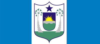 Bandeira do município de Limoeiro do Norte, estado do Ceará, Brasil.